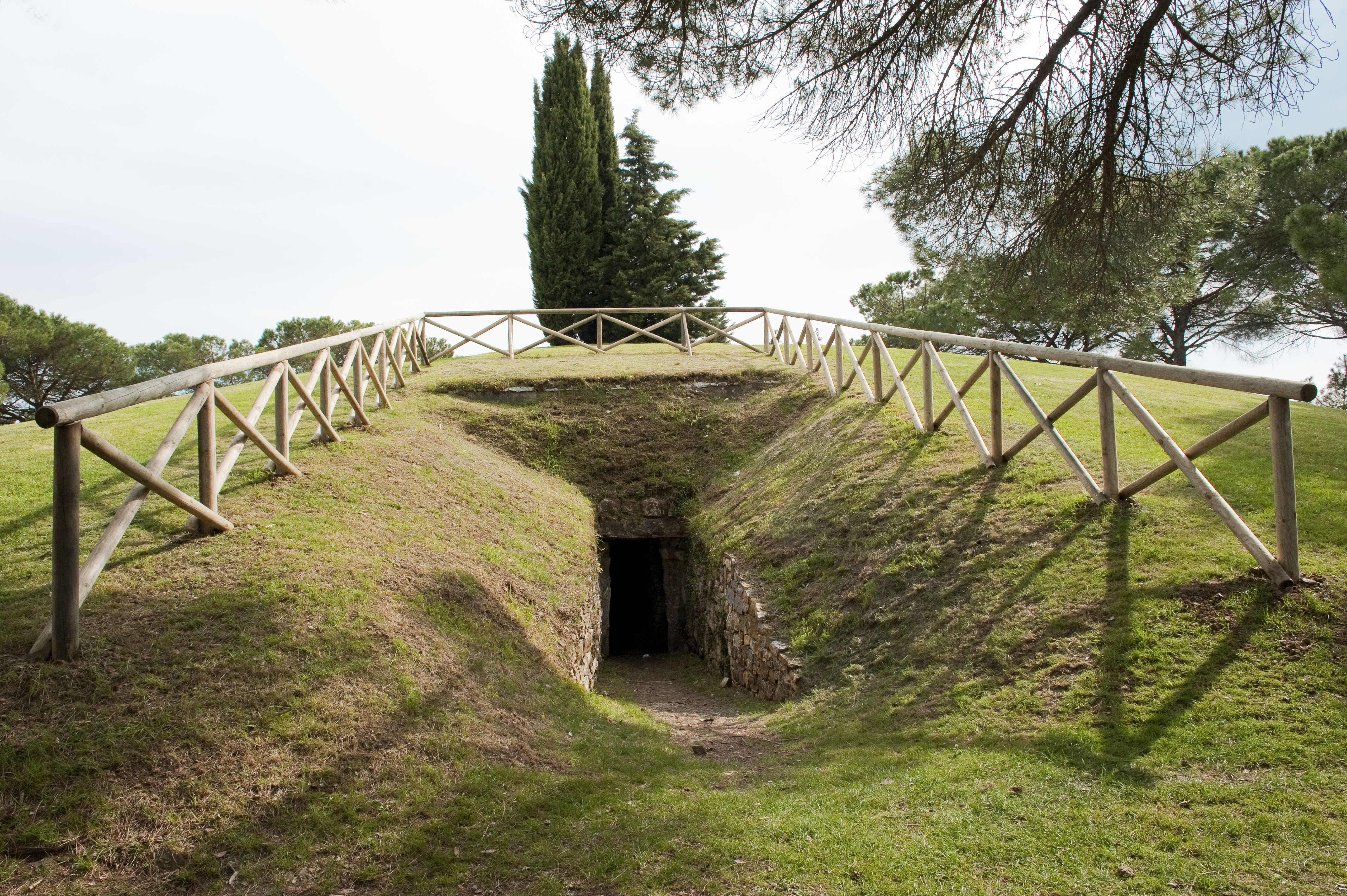 Ingresso di una delle tombe del Tumulo di Montecalvario (Castellina in Chianti)